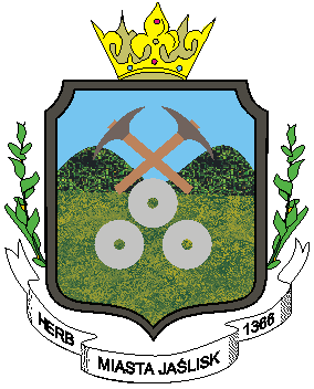 Herb dawnego miasta Jaśliska